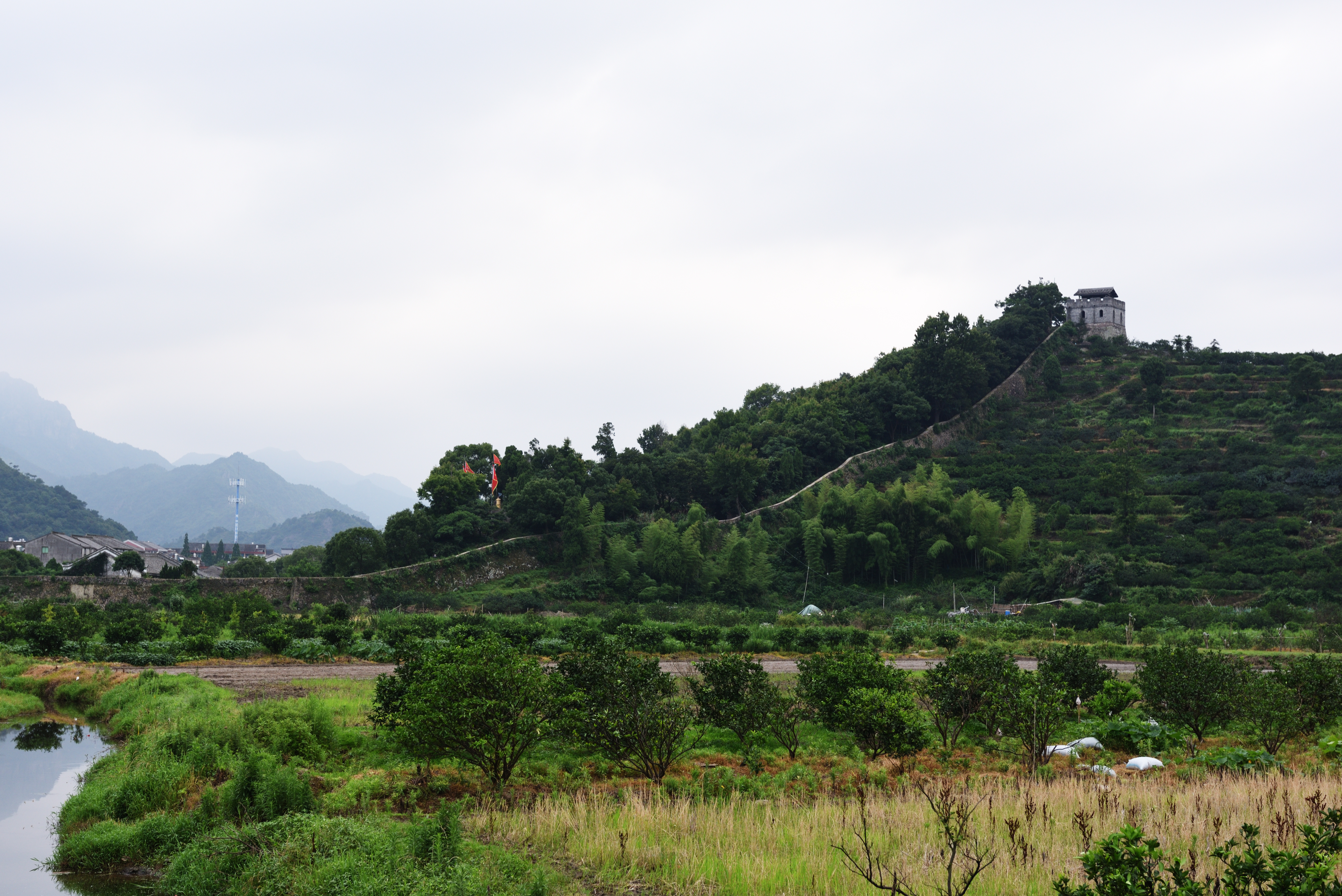 桃渚城城墙，2016-06-10